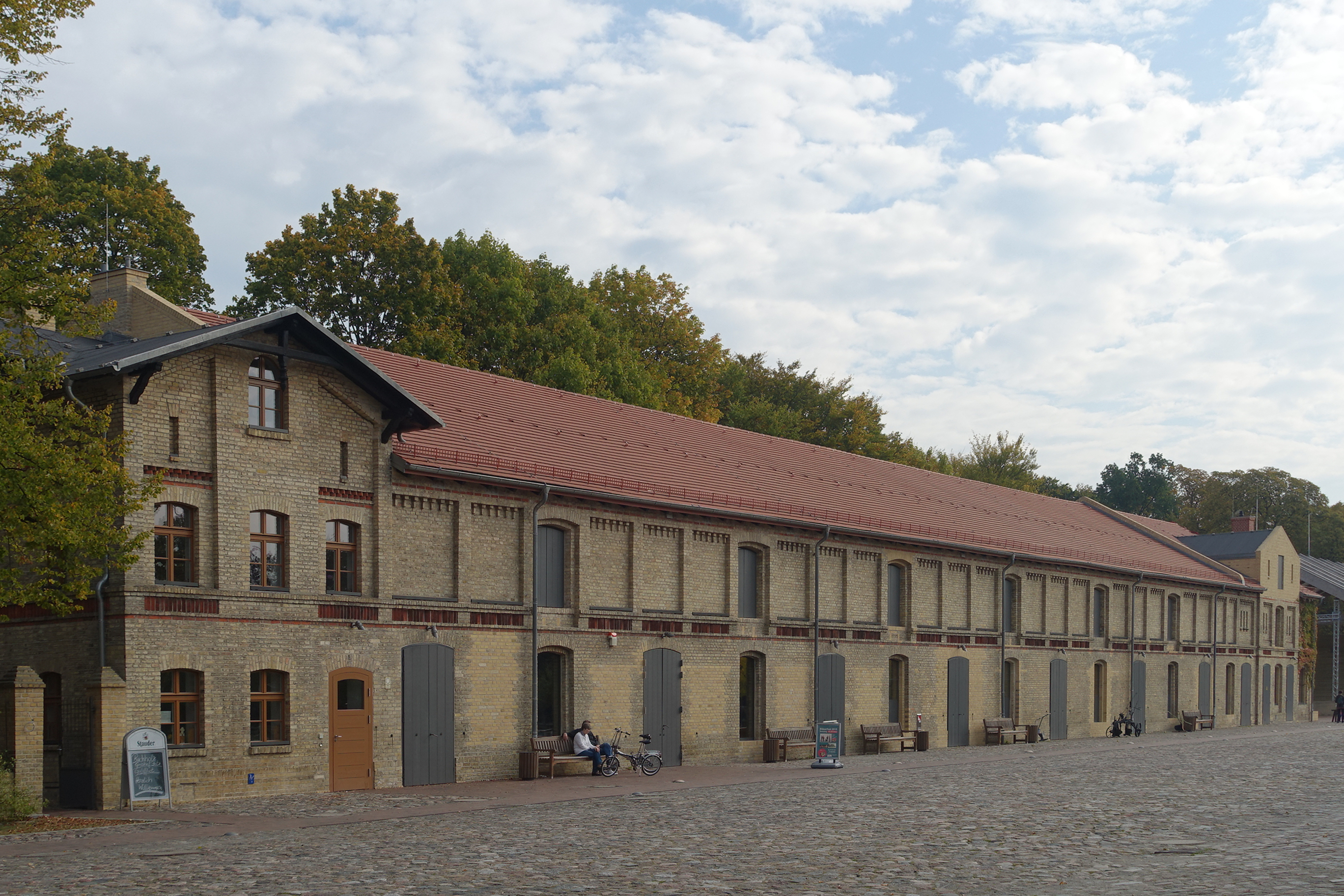 Pferdestall des Gutshofs Britz